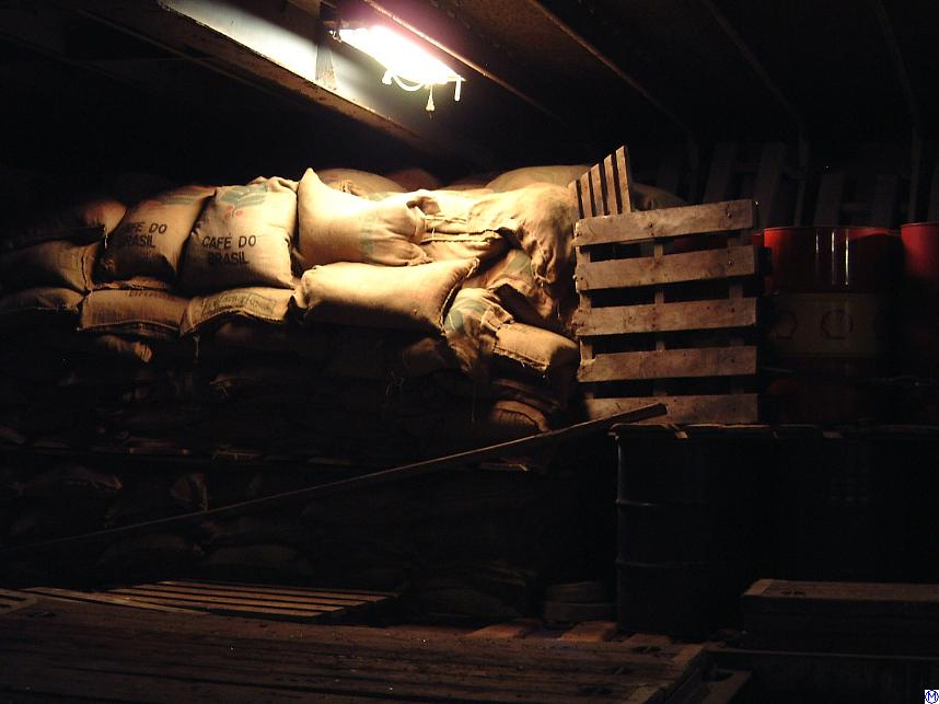 Kaffeesäcke in einem Stückgutschiff (Cap San Diego)